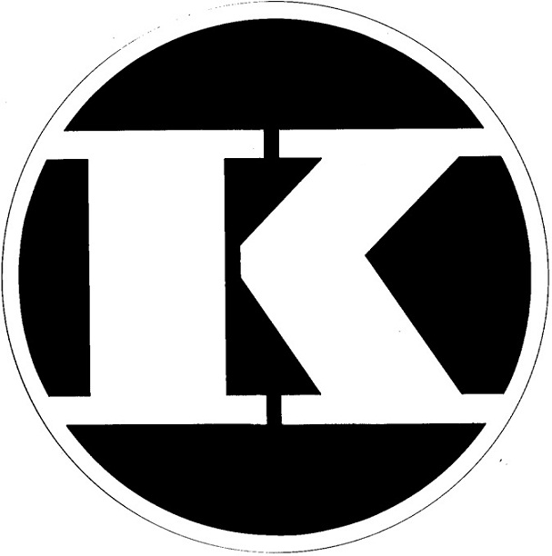 Logo der Unternehmensgruppe Kapsreiter in Schärding